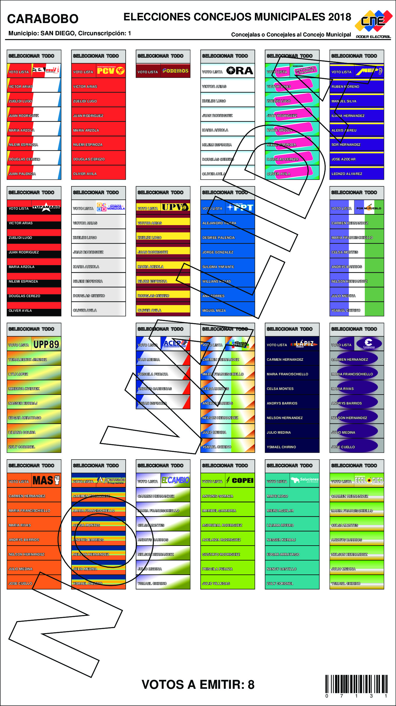 Boleta electoral para el Municipio San Diego, Carabobo, en las elecciones municipales de 2018, donde se eligen concejales.